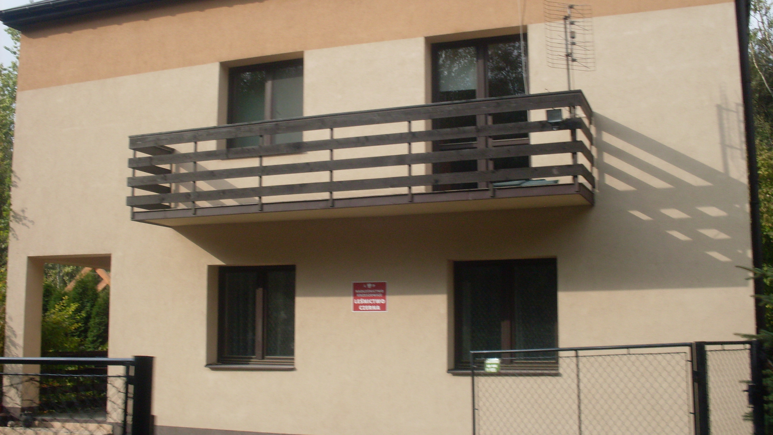 Puszcza Dulowska. Leśniczówka Czerna (Wola Filipowska)